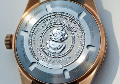 Фото часов Oris Carl Brashear Limited Edition